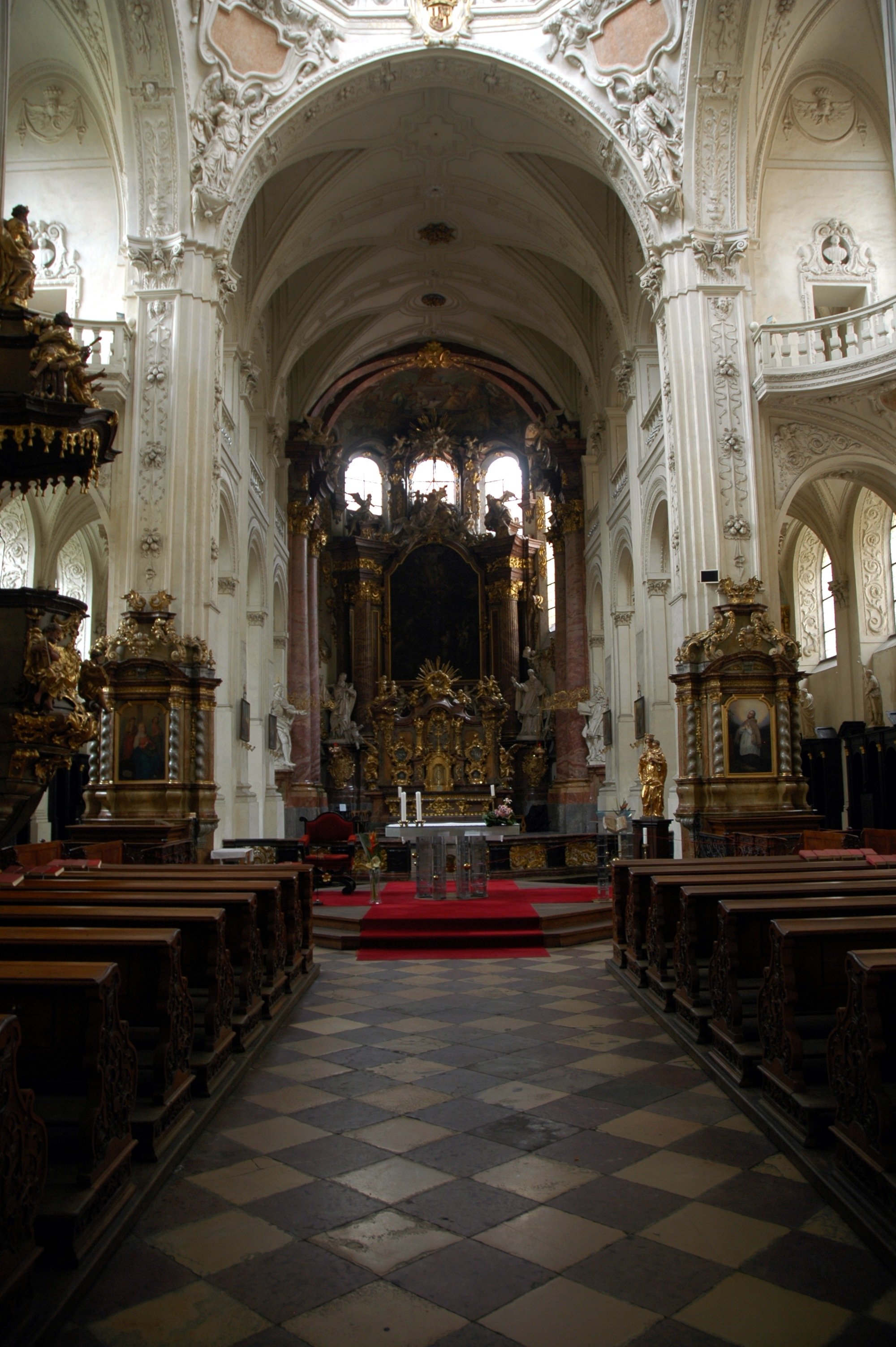 Heilige Salvator Kirche im Klementinum in Prag welches ursprünglich als Jesuitenkolleg gegrpündet wurde. Die heutige Kirche selbst wurde auf den Fundameneten der romanischen St. Clemenskirche errichtet